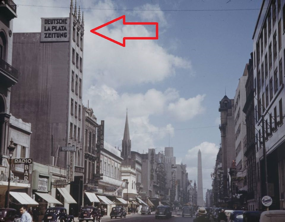 Edificio del DLPZ (Actual Av. Corrientes 672)